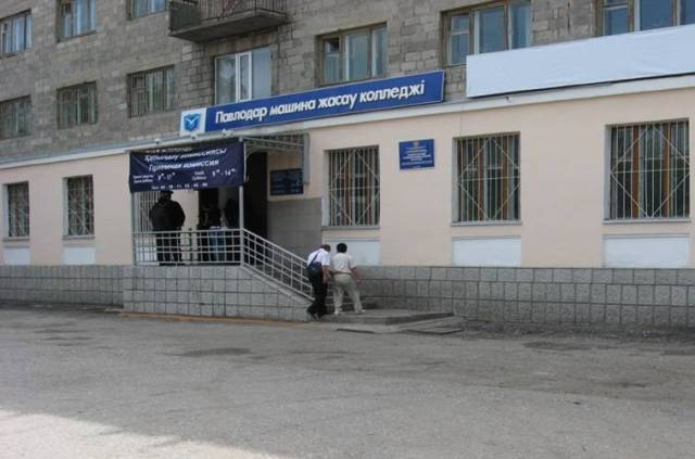 Павлодарский машиностроительный колледж